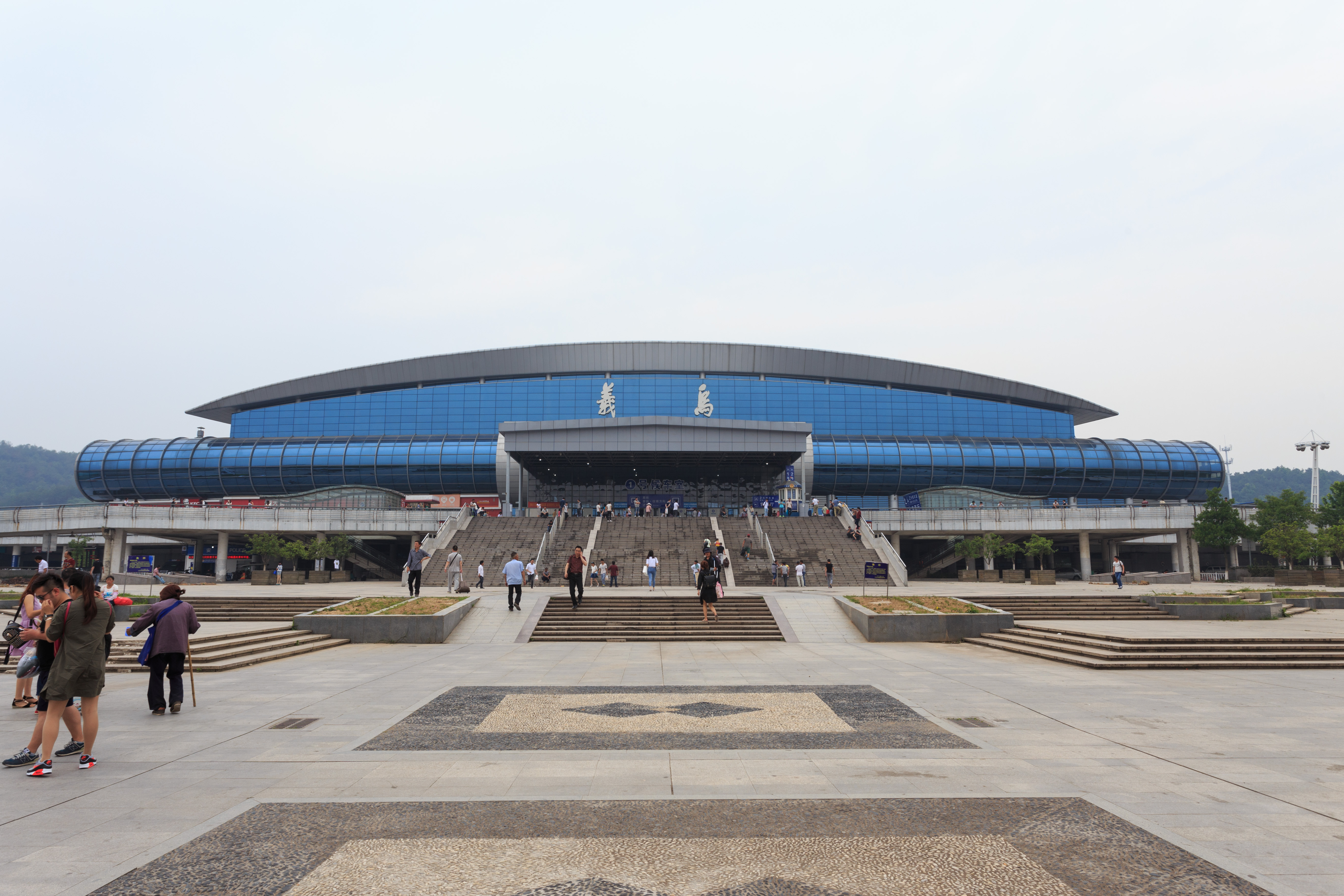 义乌火车站